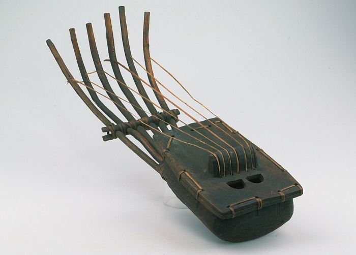 Deze samengestelde boog bevat 6 houten bogen die bij elkaar worden gehouden door middel van 2 dwarslatten en reepjes rotan. Het houten klanklichaam is voorzien van een kam waarover de snaren lopen die van plantaardige vezels zijn gemaakt. Vlak onder de kam bevinden zich twee klankgaten.